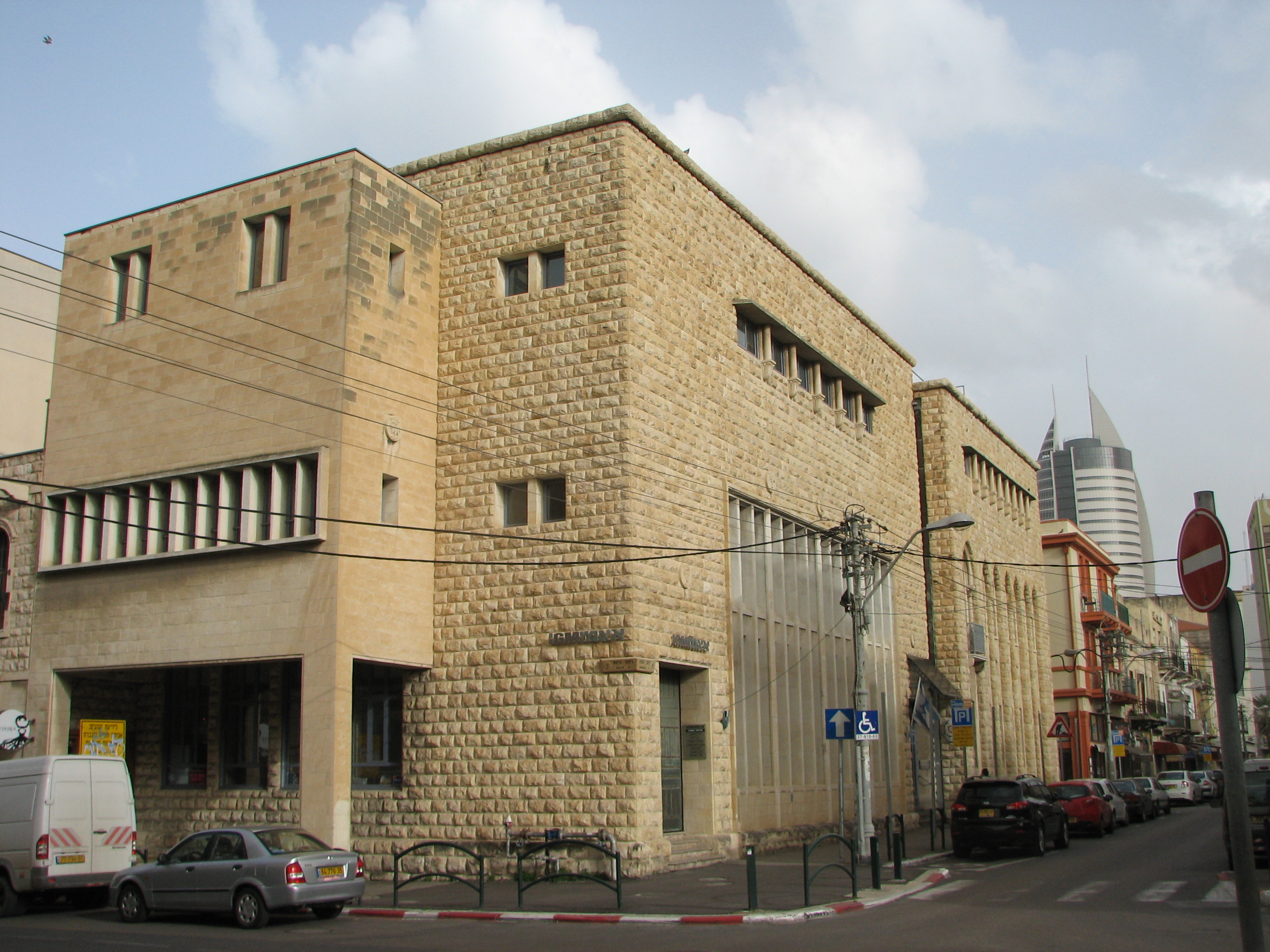 City Building, Haifa בני הסיטי בחיפה בעיר התחתית ברחוב נתנזון 1 לשעבר דרך יפו. נבנה ב-1925 כדי לשמש כסניף בחיפה של בנק אפ"ק. היום משמש כמבנה עסקים, שוכנת בו הקונסוליה של פורטוגל